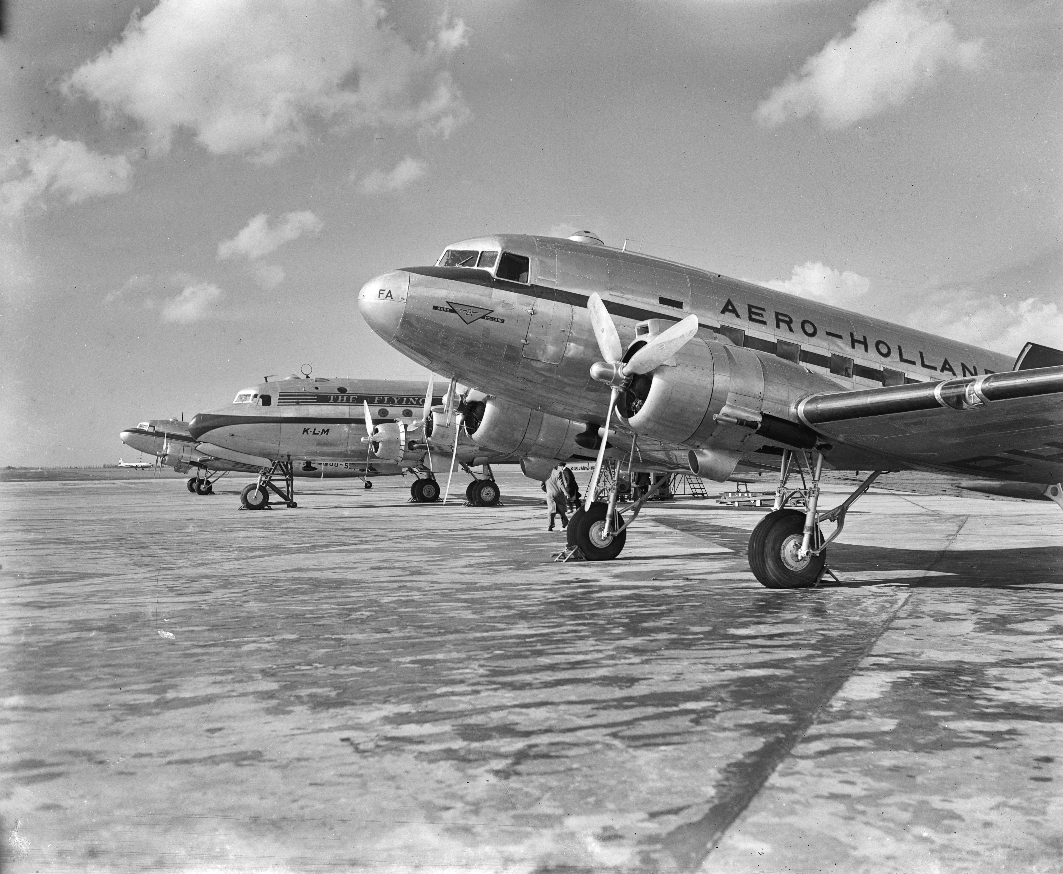 Collectie / Archief : Fotocollectie Anefo Reportage / Serie : [ onbekend ] Beschrijving : Dakota van de "Aero-Holland" Datum : 2 april 1948 Instellingsnaam : Dakota Fotograaf : Vrind, Luuk / Anefo Auteursrechthebbende : Nationaal Archief Materiaalsoort : Negatief (zwart/wit) Nummer archiefinventaris : bekijk toegang 2.24.01.04 Bestanddeelnummer : 902-6664